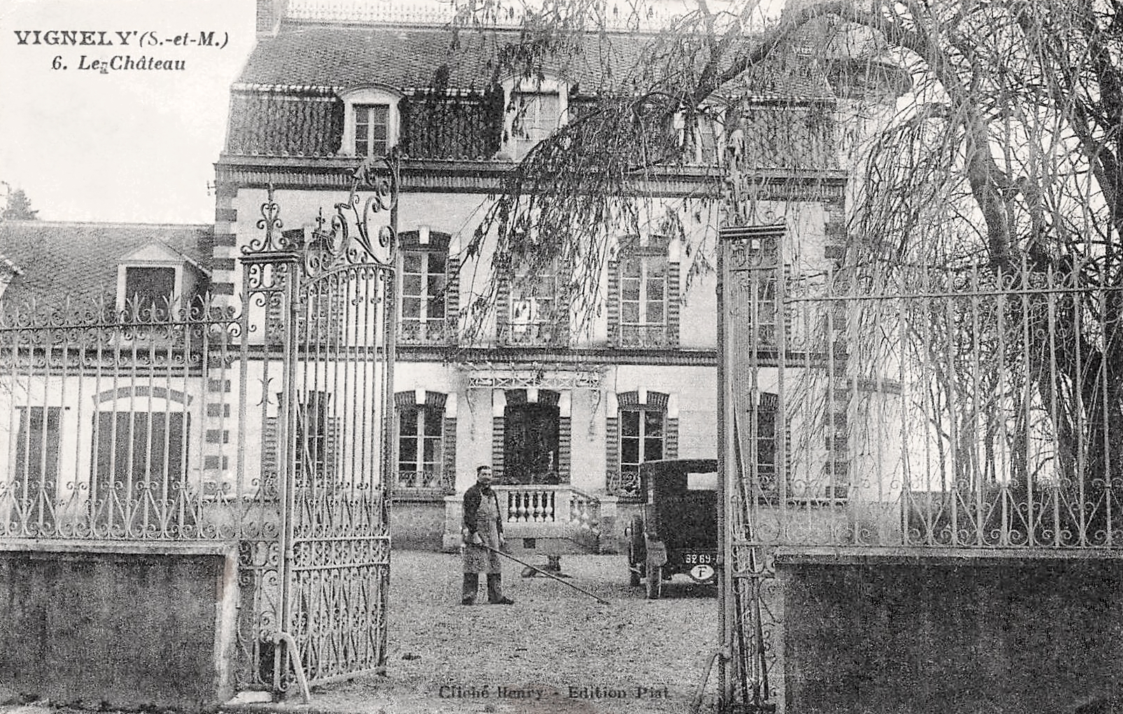 Château de Vignely (Seine-et-Marne), carte postale ancienne.